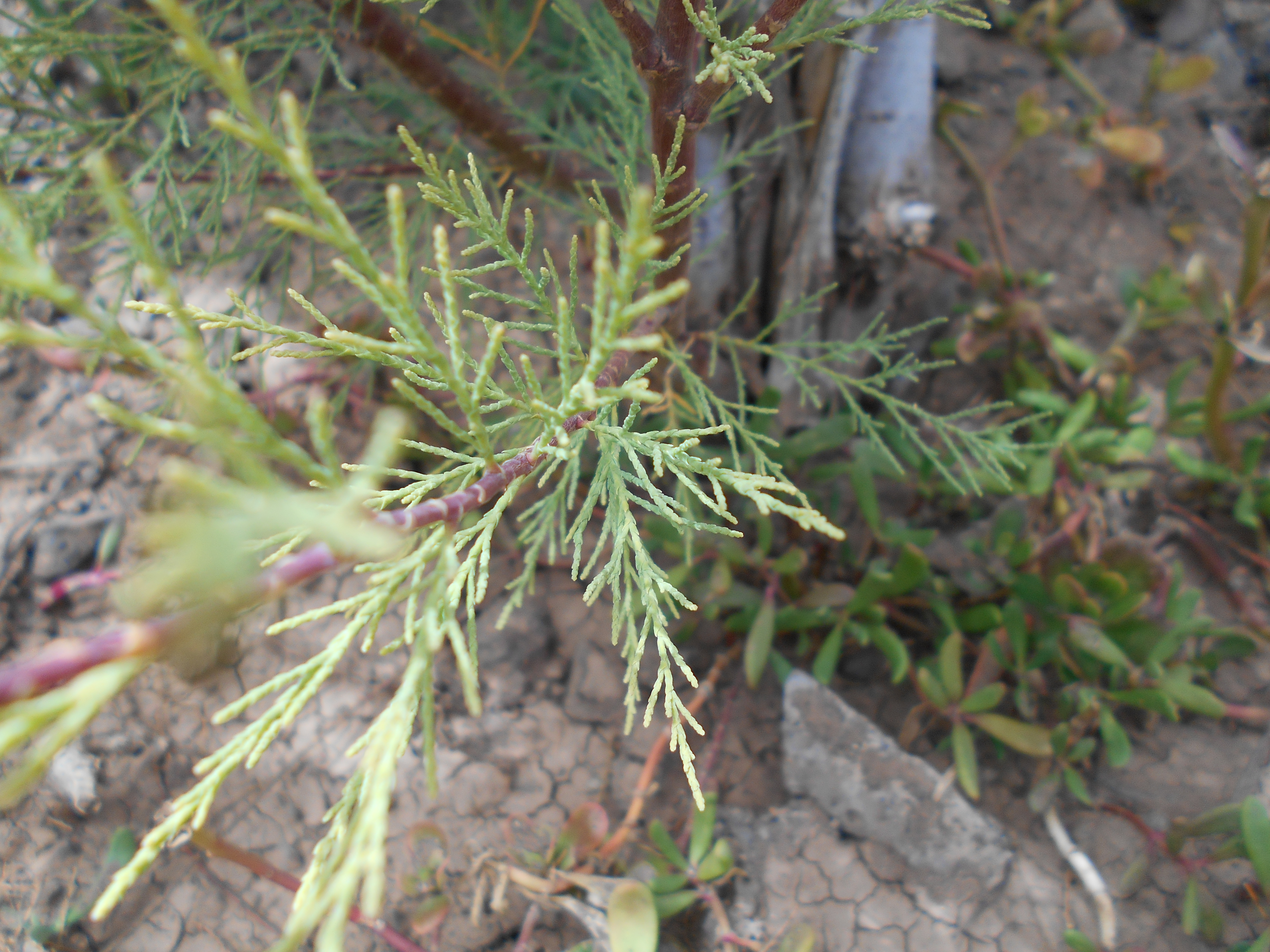 Foglie di un'esemplare di tamarix senegalensis